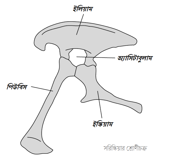 সরিস্কিয়া জাতীয় ডাইনোসরদের শ্রোণীচক্রের সাধারণ গঠন। প্রধান হাড়গুলো চিহ্নিত করা আছে।